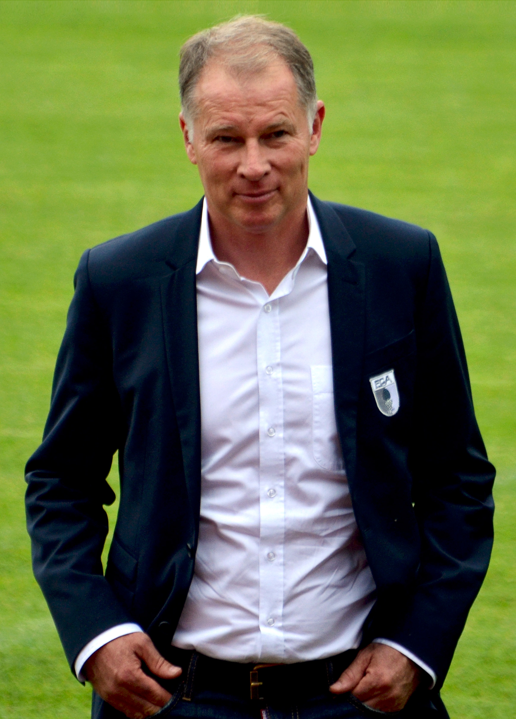 Stefan Reuter, Manager FC Augsburg (2016)